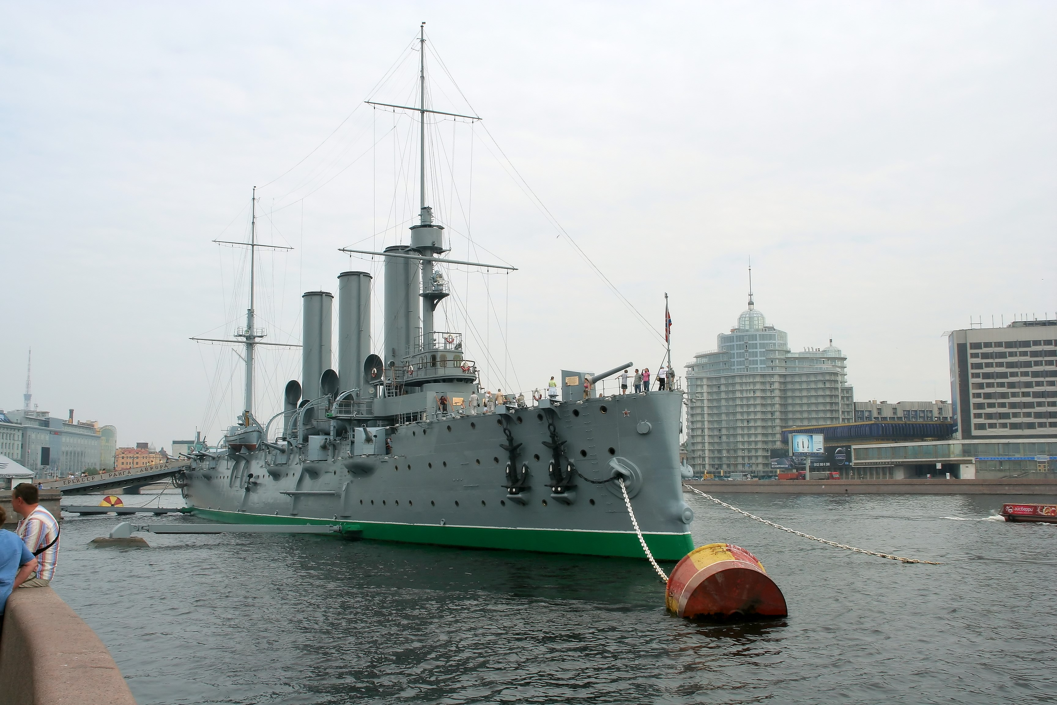 Panzerkreuzer Aurora